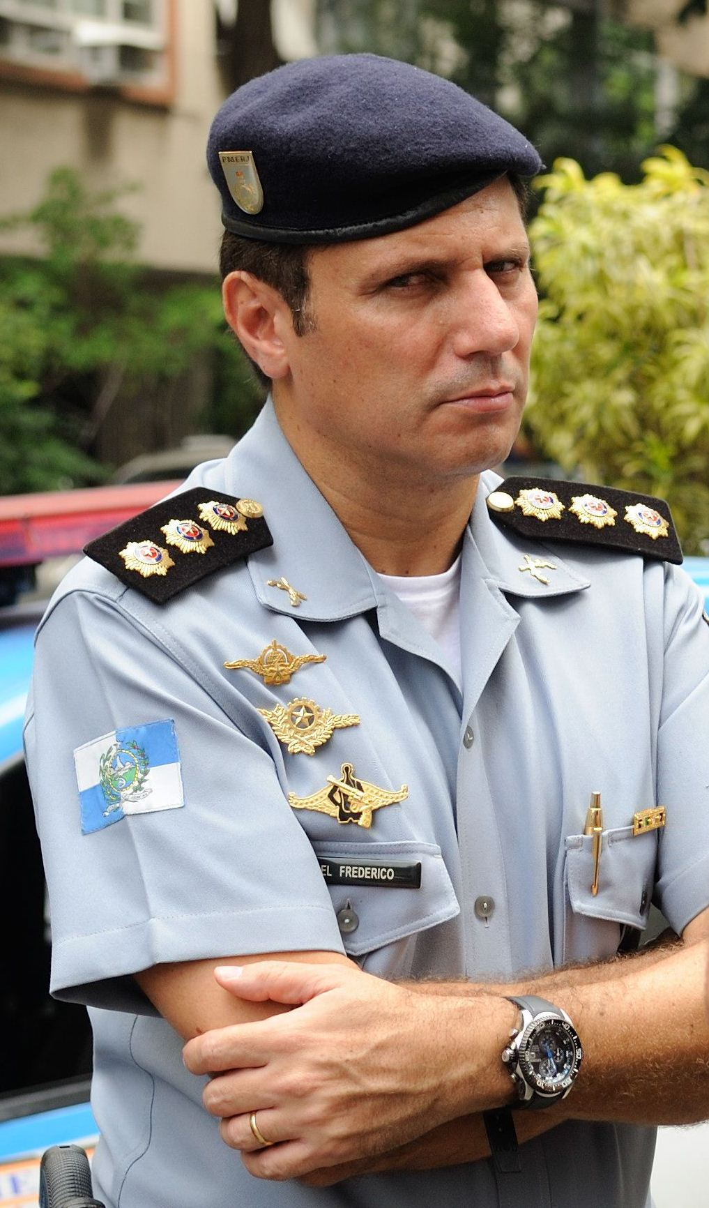 O comandante das unidades de Polícia Pacificadora, coronel Frederico Caldas, acompanha investigação no Pavão-Pavãozinho sobre a morte do dançarino Douglas da Silva